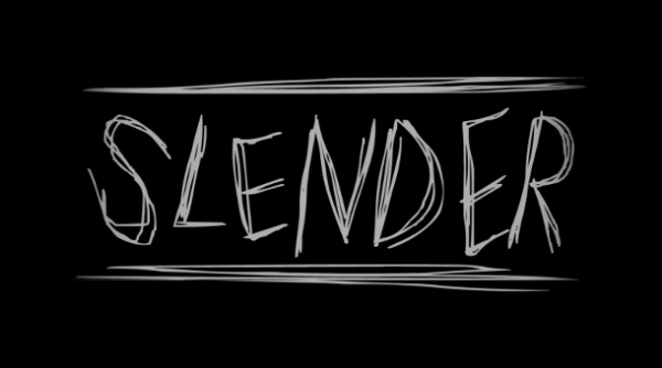 Логотип игры.